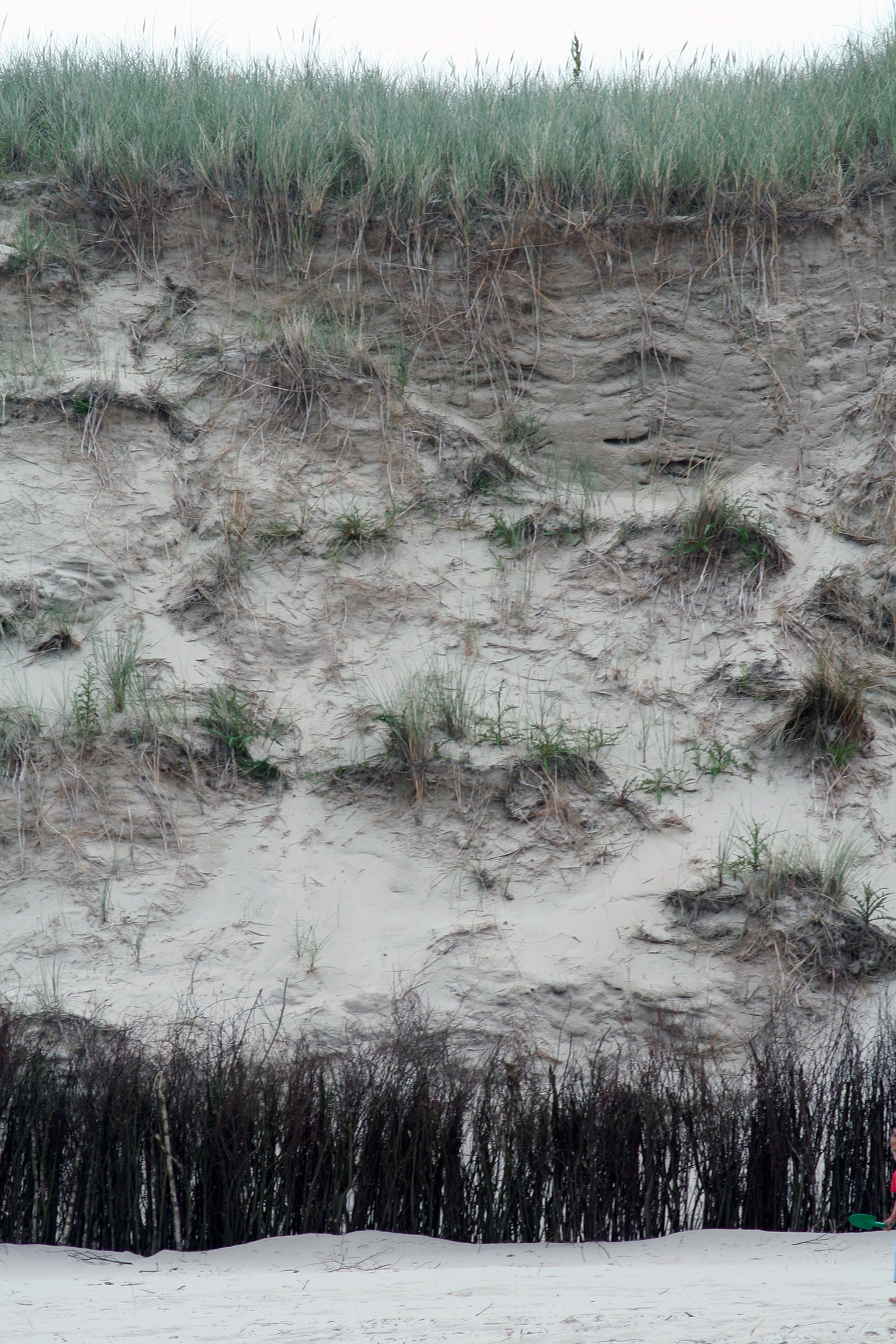 Anschnitt einer Düne. Standort: Spiekeroog, Höhe Sterneck